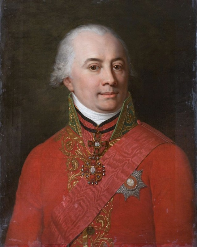 Муравьев М(ихаил?) Н(икитич?)